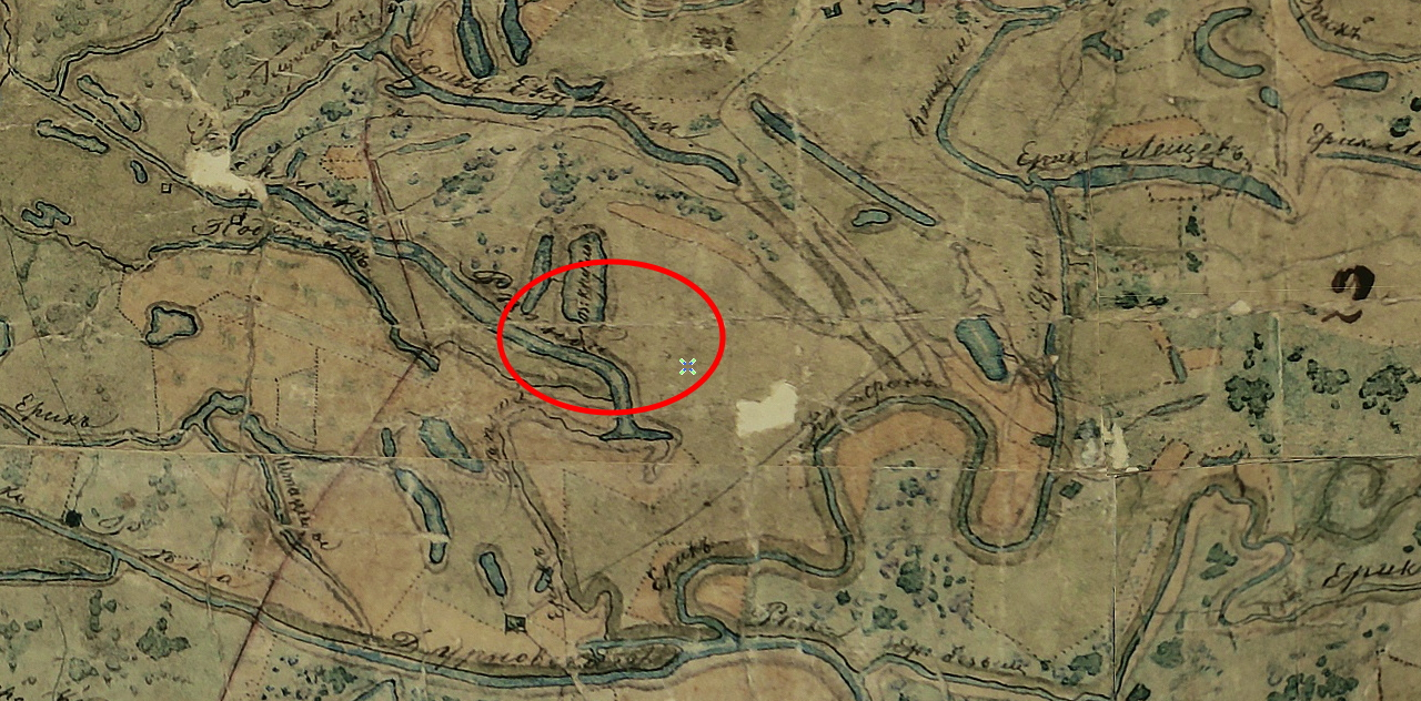 План Генерального межевания (ПГМ) Царицынского уезда Саратовской губернии. Отмечено примерное местоположение хутора Репино Волгоградской области. Масштаб: 2 версты в дюйме.